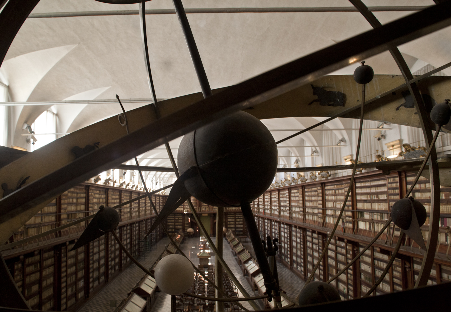 Biblioteca Casanatense - MIBAC This is a photo of a monument which is part of cultural heritage of Italy.